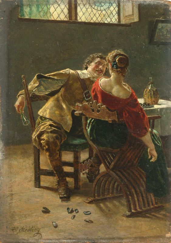 Das Muschelessen